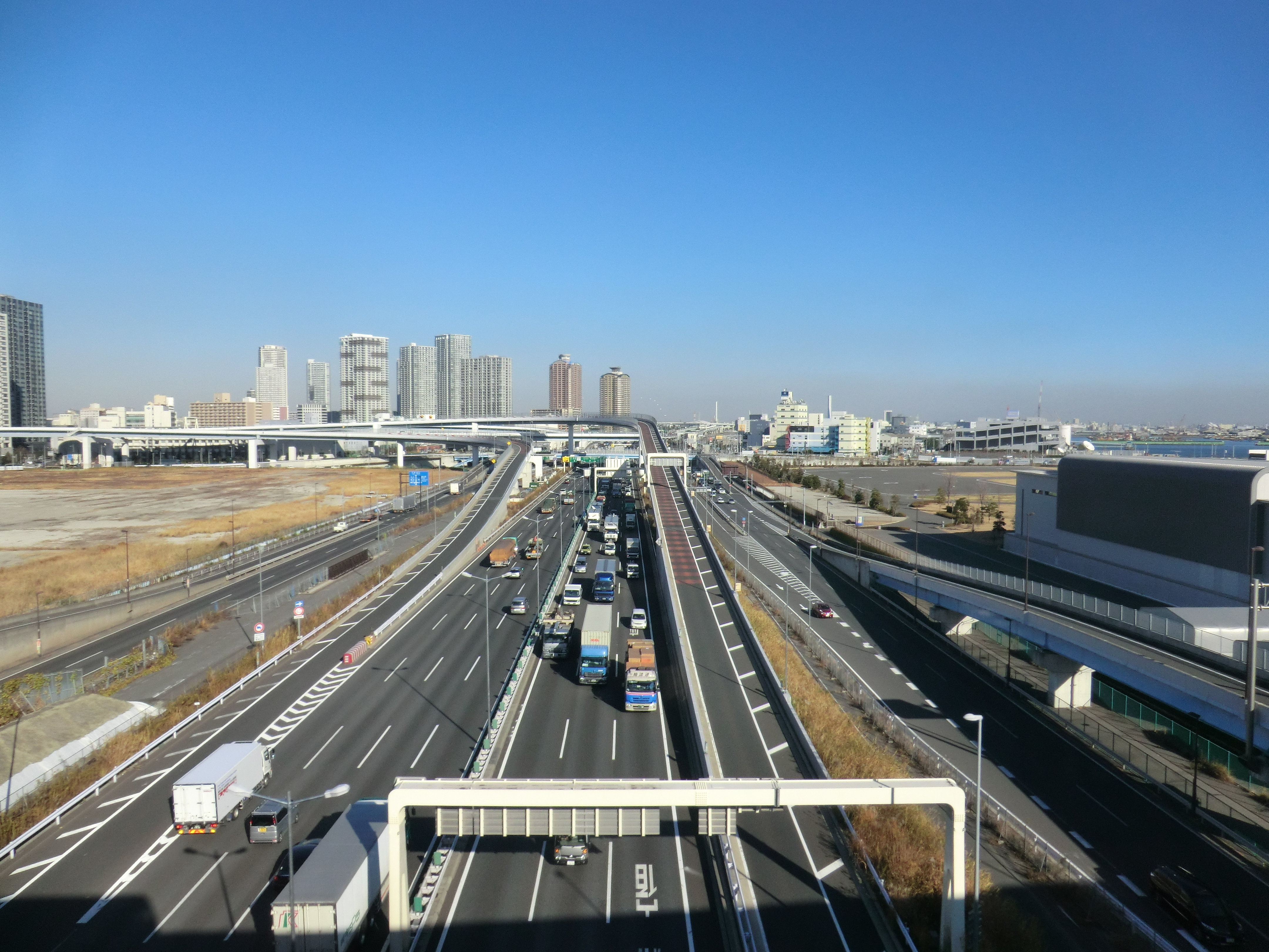 首都高速道路東雲ジャンクションを千葉方向へ望む